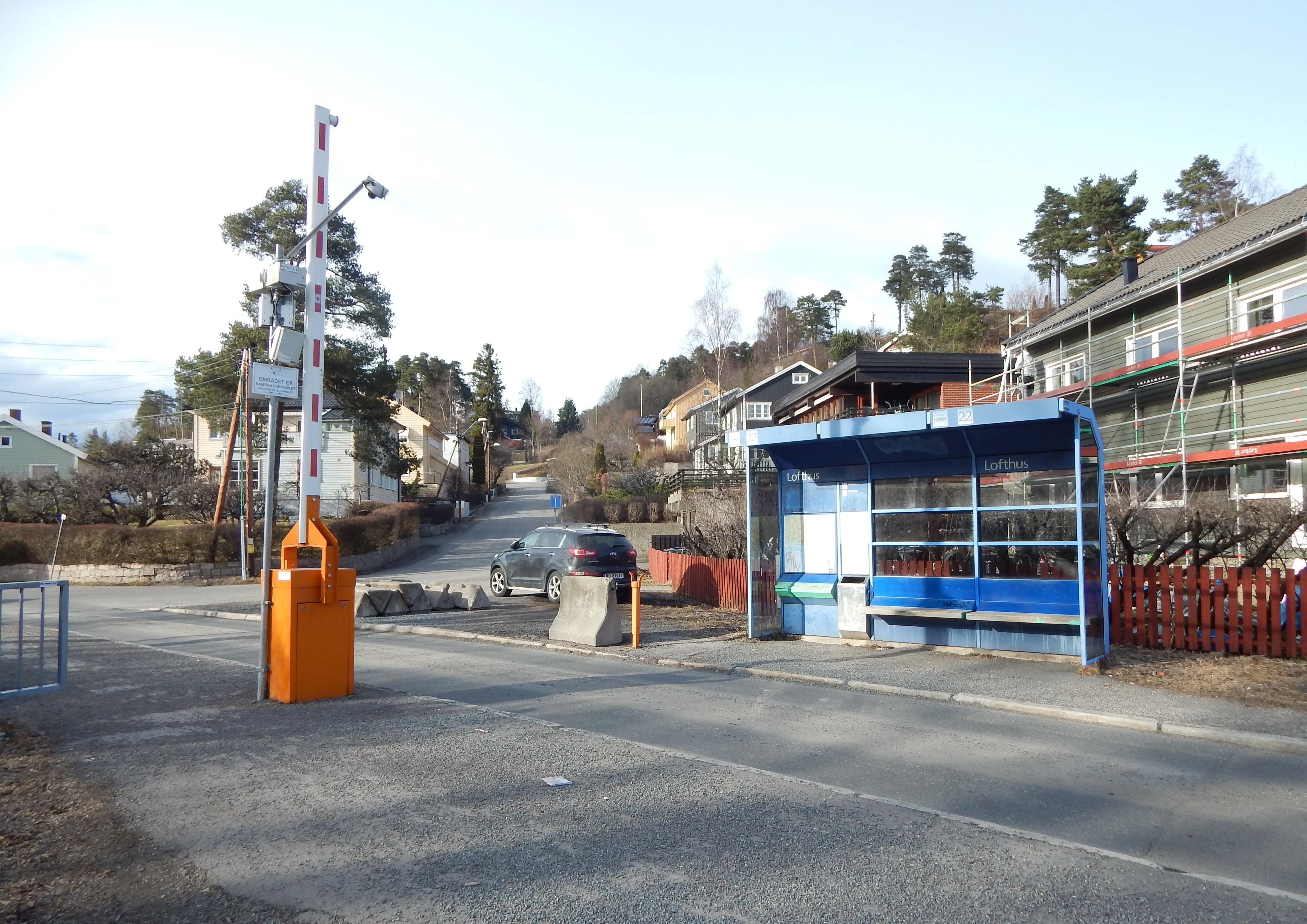 Lofthus bussholdeplass ved Mons Søviks plass